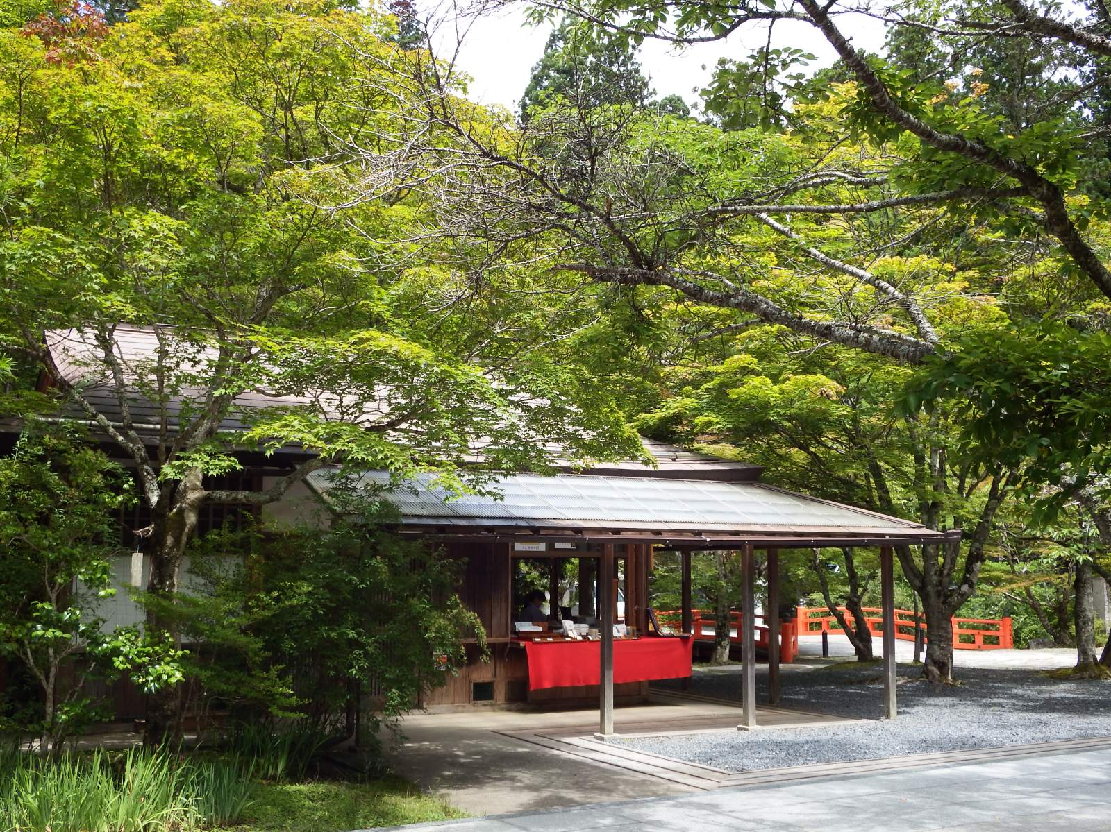 高野山奥の院 ガイド協会の売店